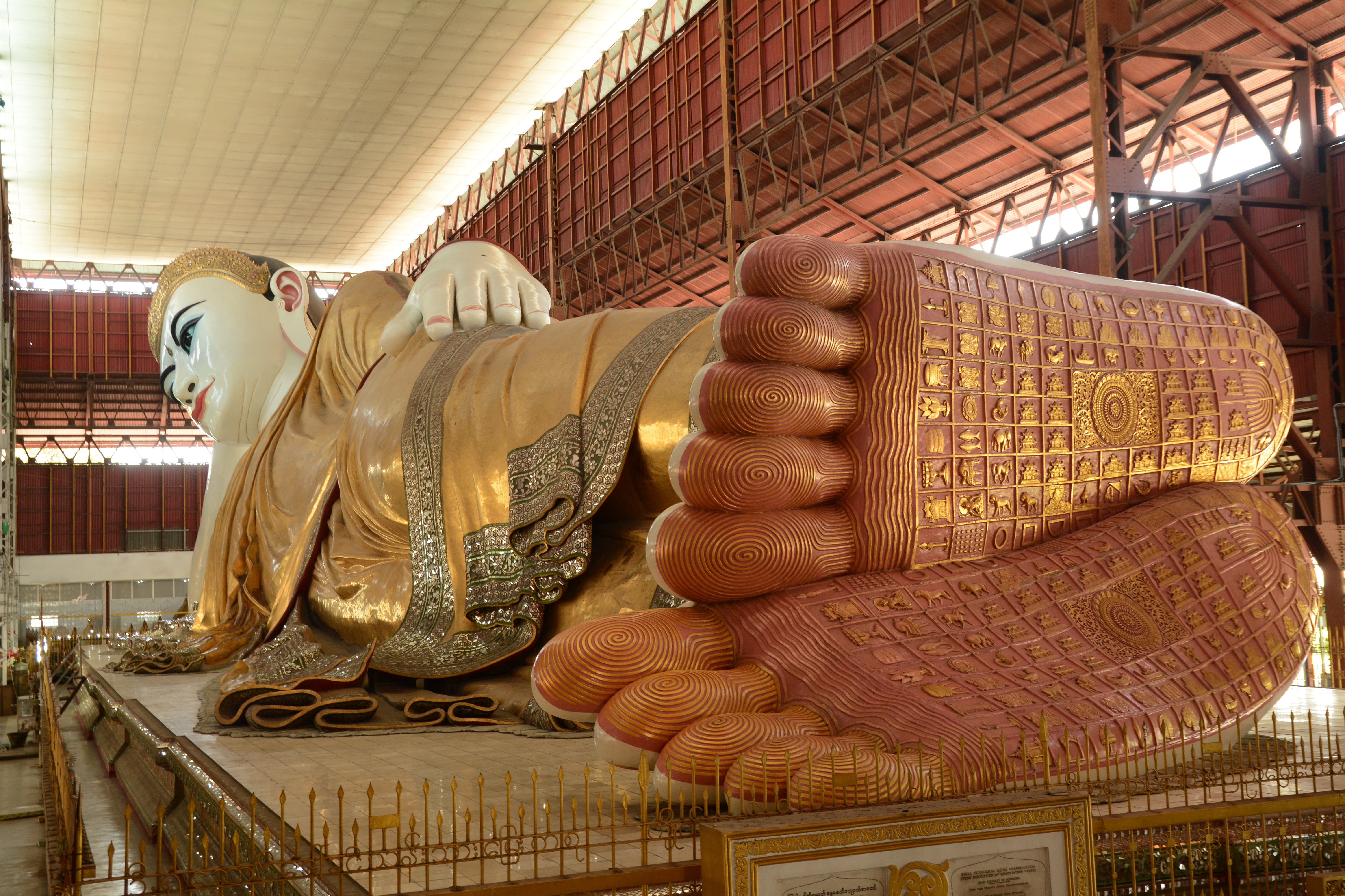 Chauk Htat Gyi Pagoda